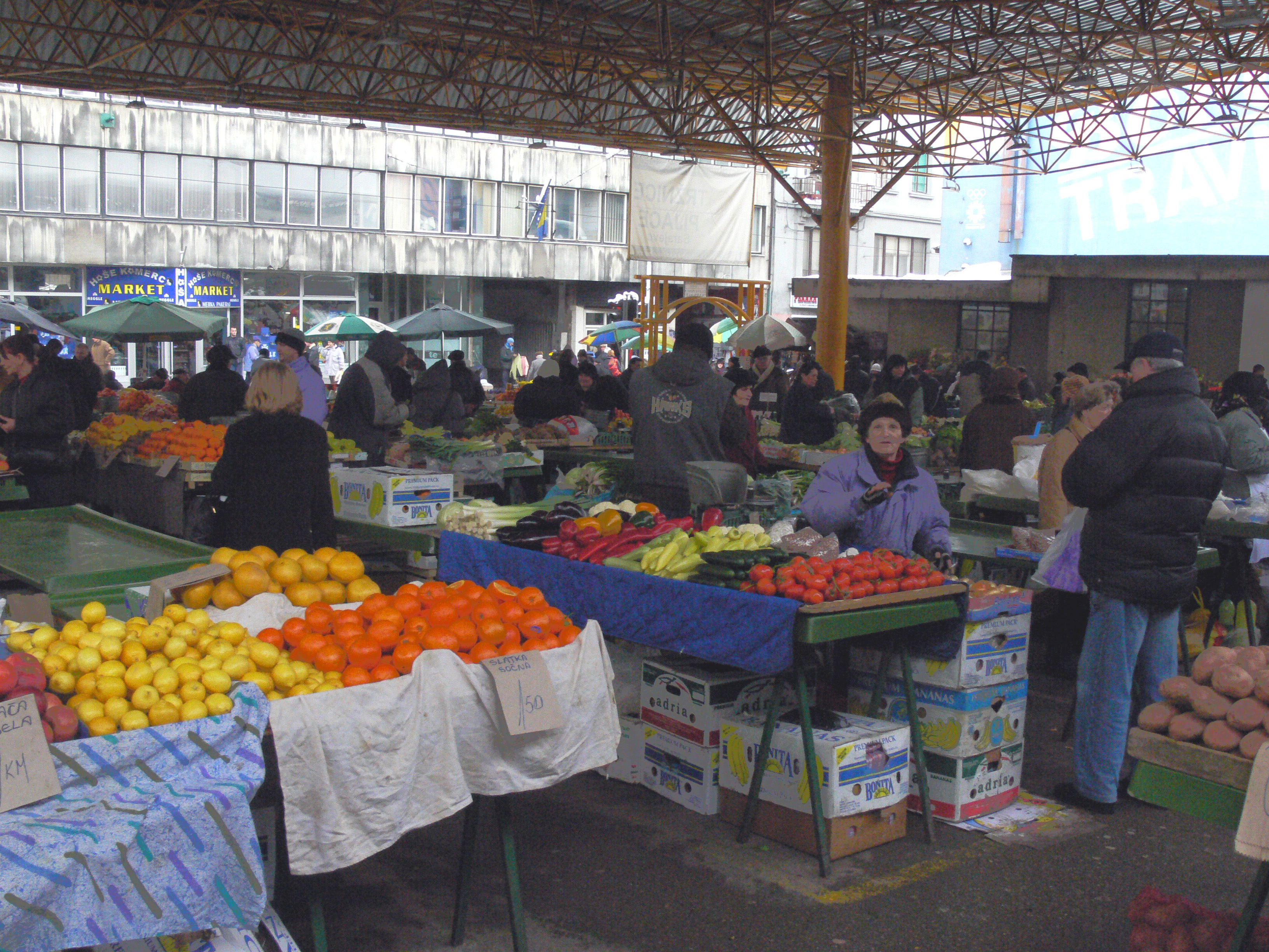 Sarajevo in Winter. Sarajevo market.